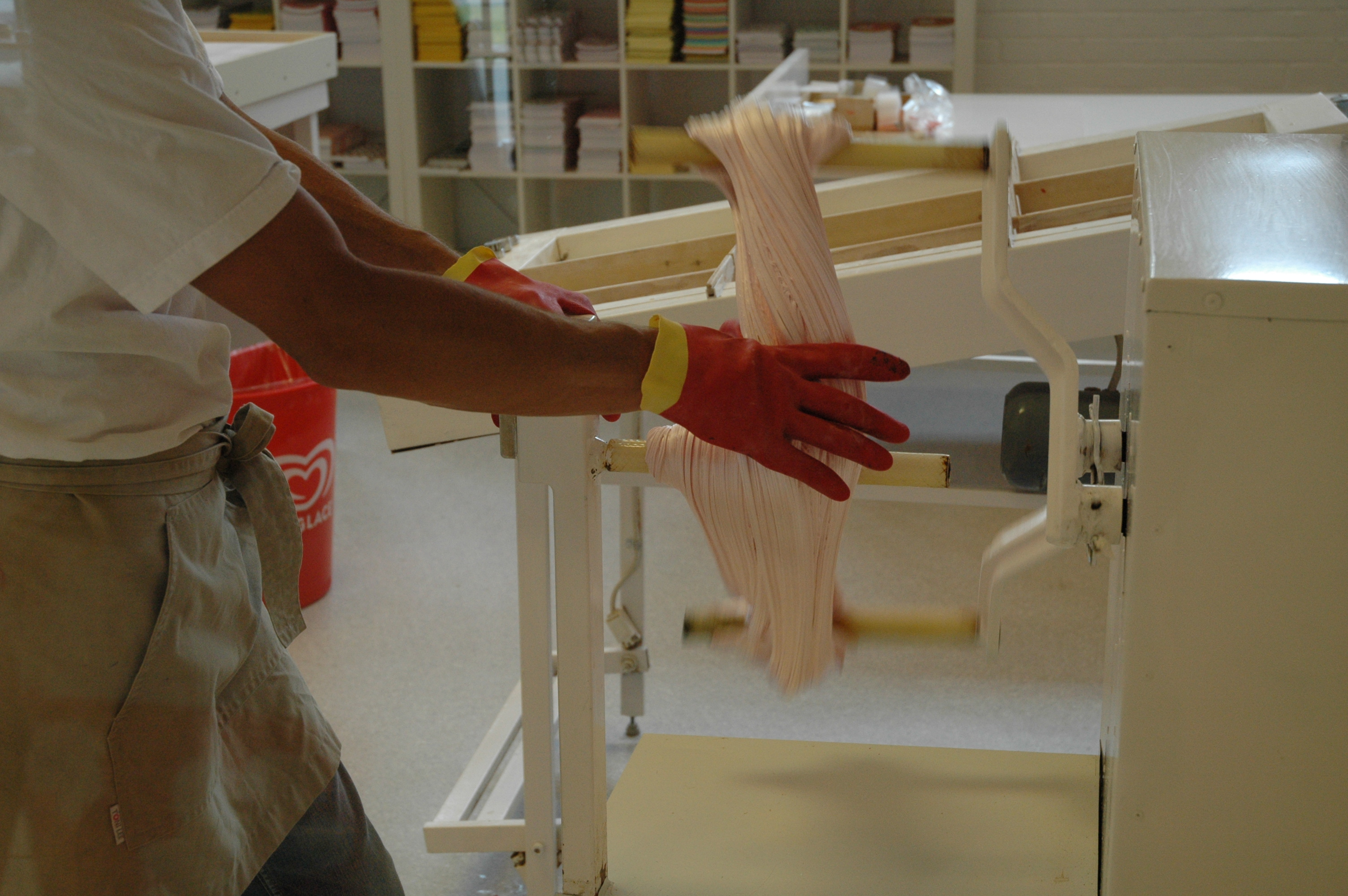 The making of polkagrisar in Gränna, Sweden.